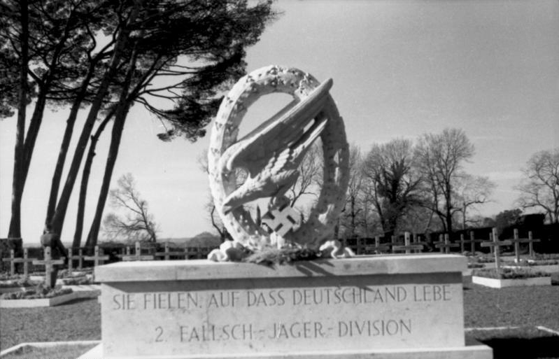 Information added by Wikimedia users.* Cimitero della seconda Fallschirmjäger-Division nazista in Italia, nel 1943.